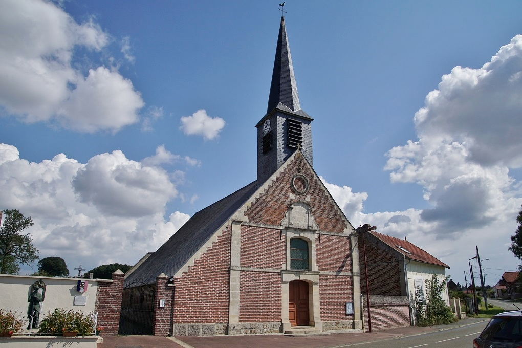 Église Notre Dame de Frétoy-le-Château (60).